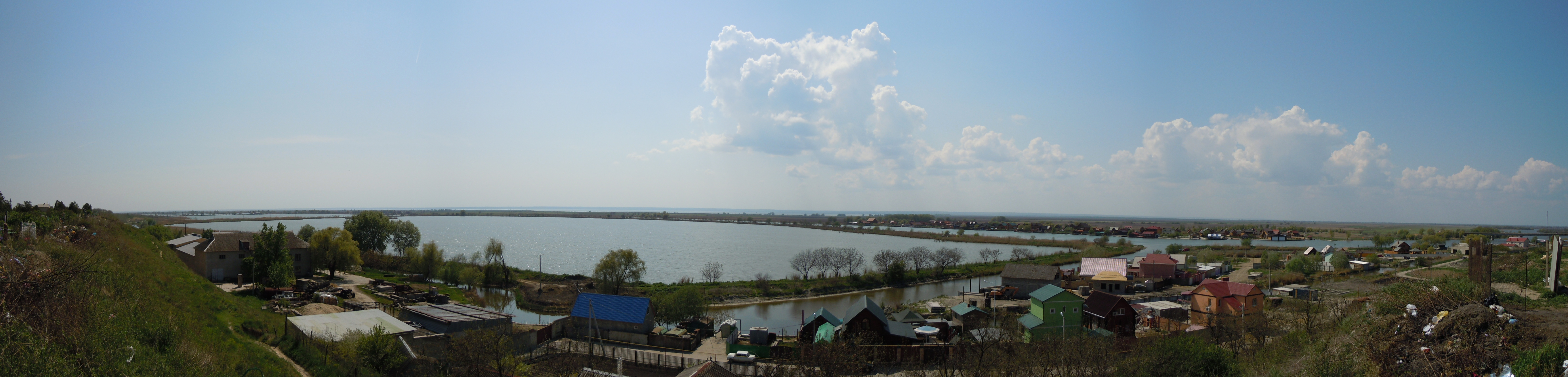 Панорама Дністра з села Маяки, Біляївський район